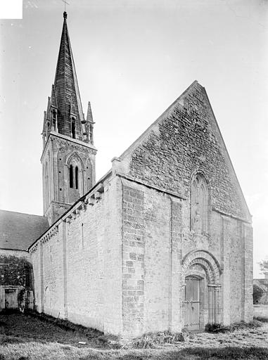 Église d'Asnières-en-Bessin par Henri Heuzé avant 1919.